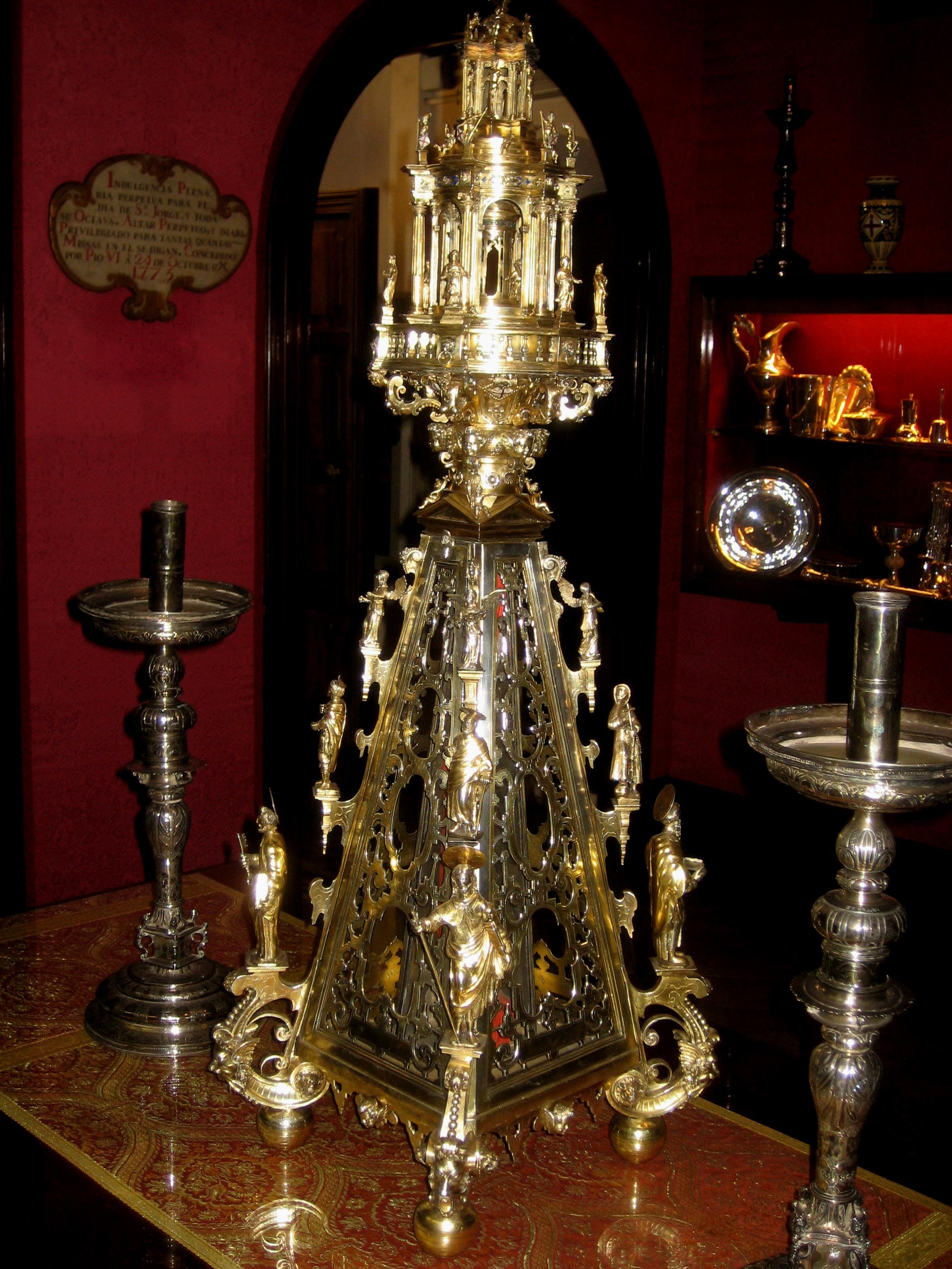 Relicario con fémur de San Jorge en la sacristía de la capilla de San Jorge en el Palacio de la Generalidad de Cataluña